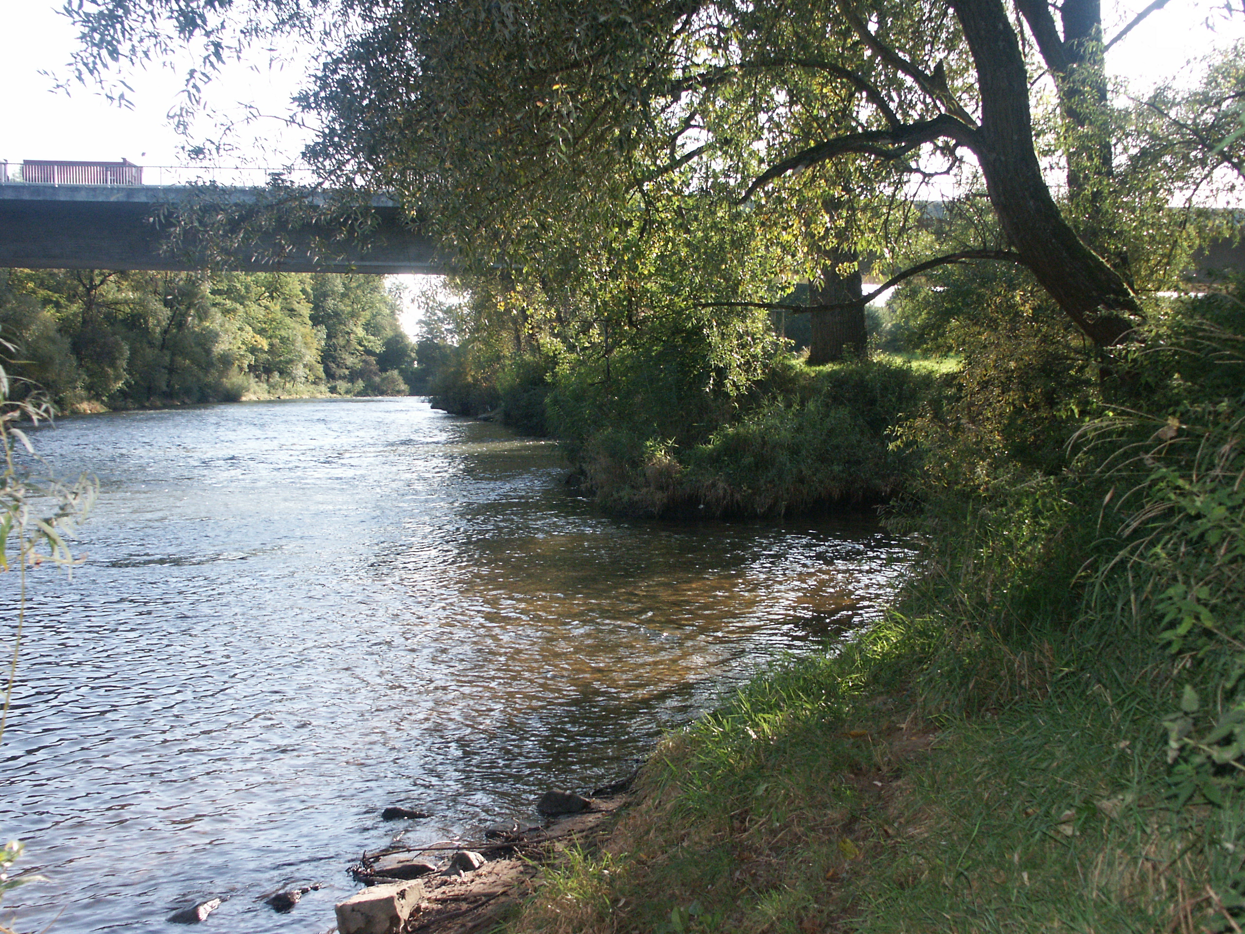 Aichmündung bei Nürtingen Zizishausen